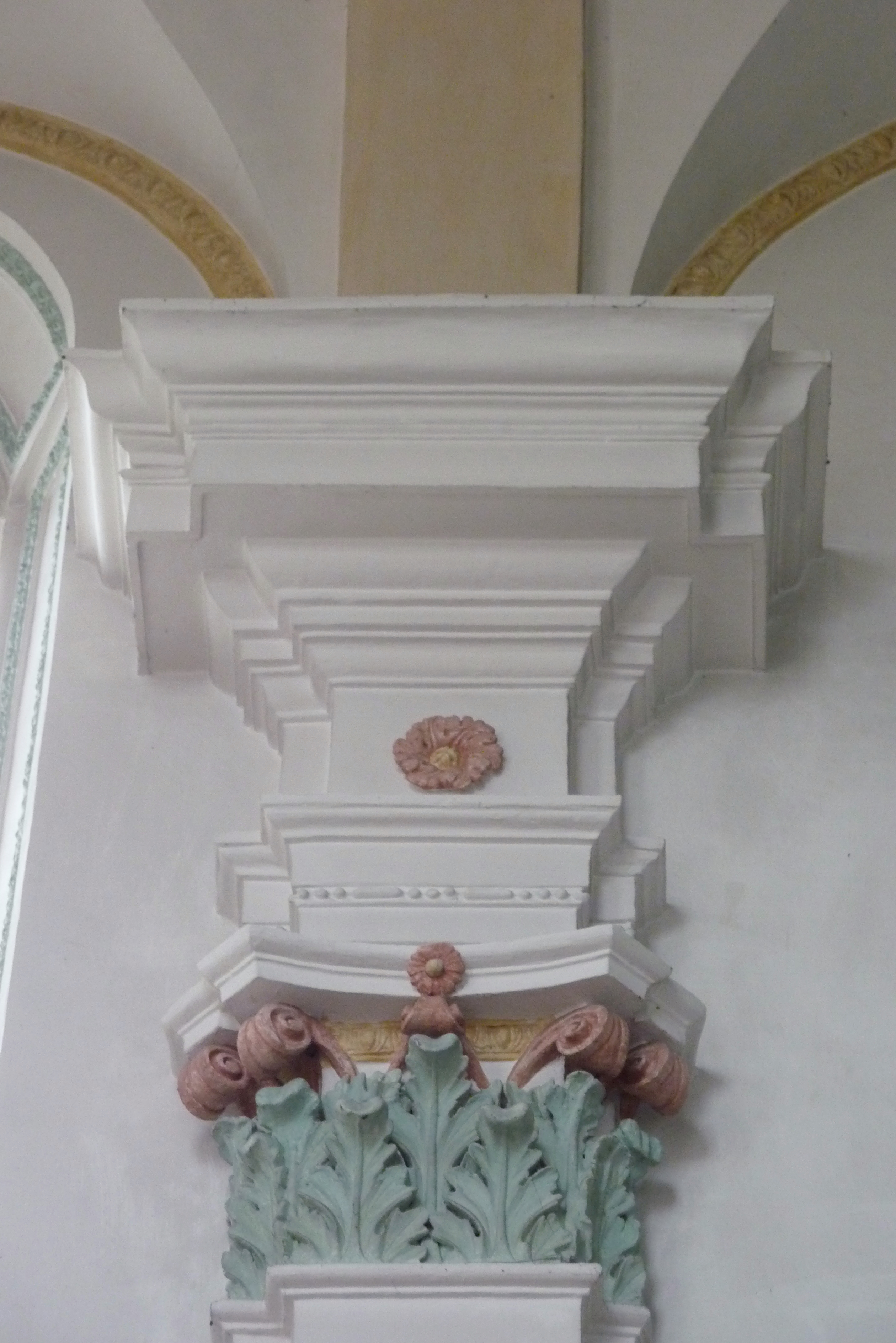 Katholische Pfarr- und Wallfahrtskirche Unsere Liebe Frau im Moos in Kicklingen (Dillingen an der Donau), Pilasterkapitell mit Stuck von 1702 von Hieronymus Mair